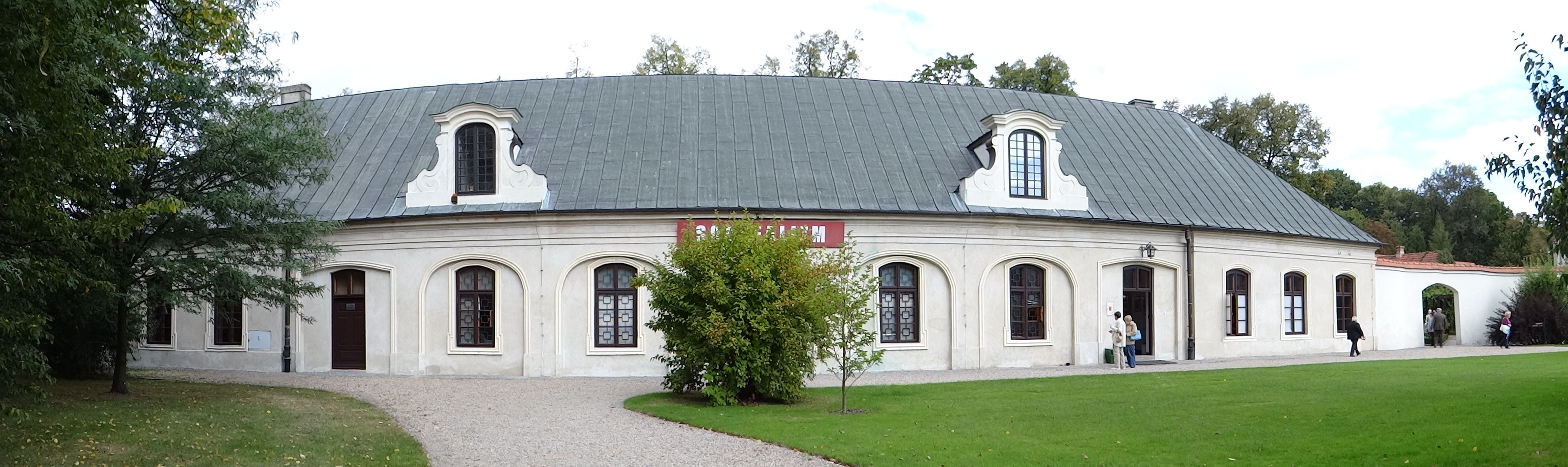 Pawilon północny - dawniej była w nim wozownia, dziś Galeria sztuki Socrealistycznej